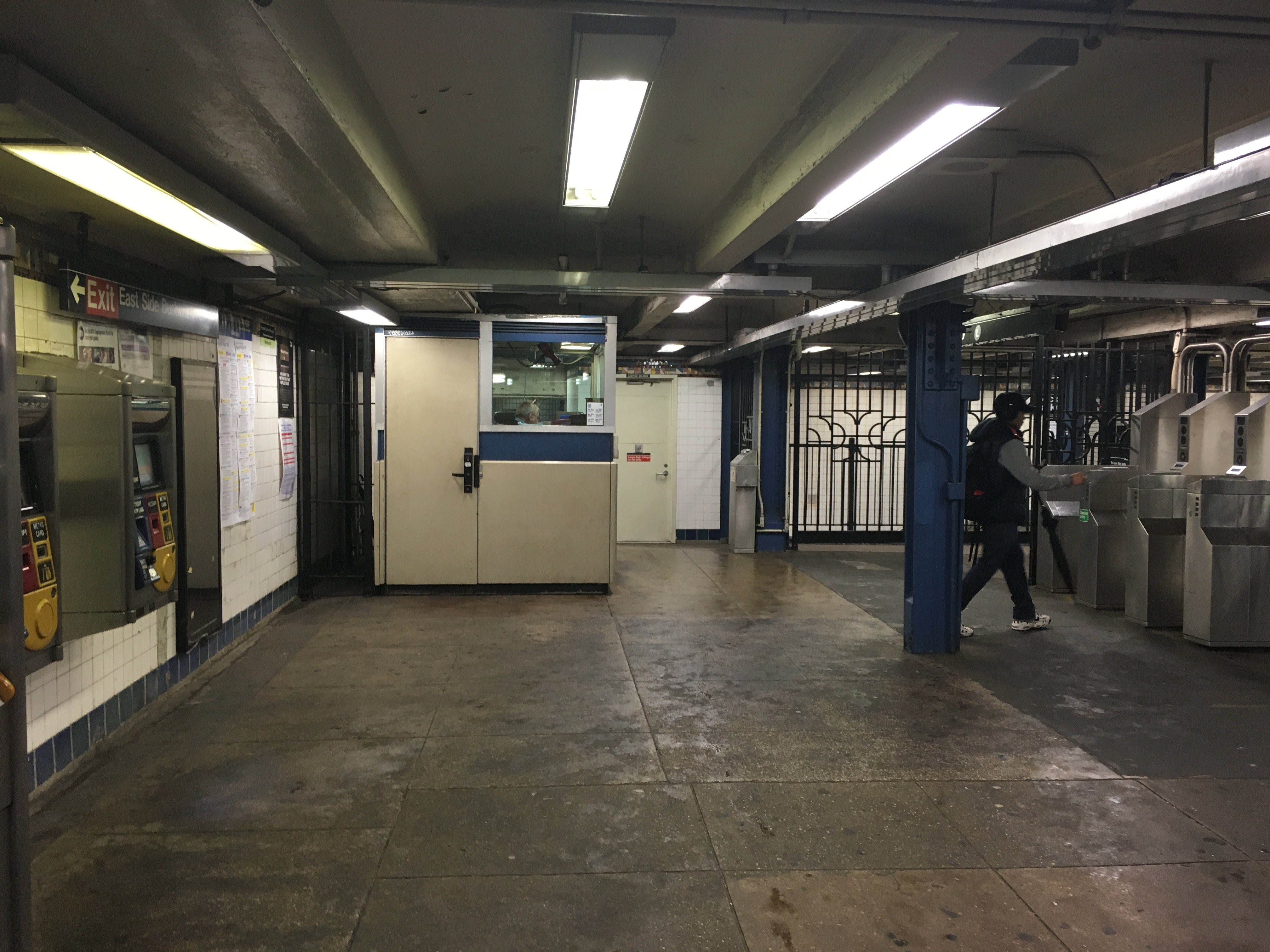 Subway